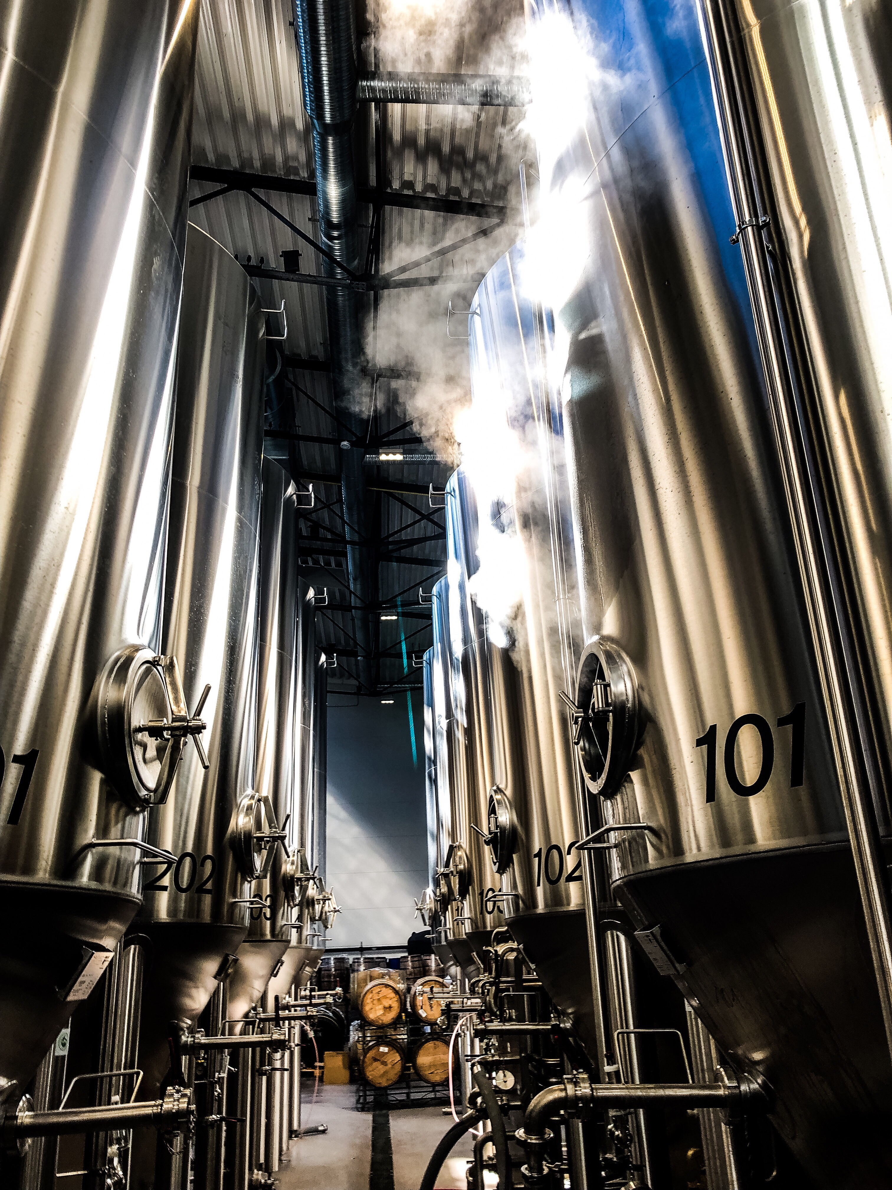 Põhjala Pruulikoda